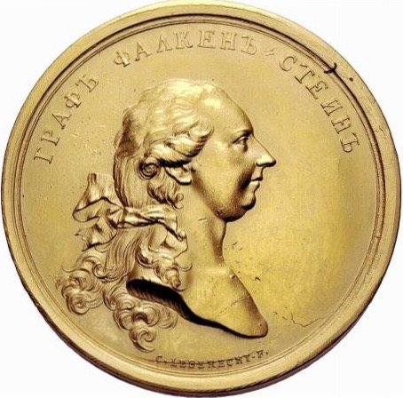 Denkmünze auf die erste Russlandreise Kaiser Josephs II. Umschrift: "ГРАФЪ ФАЛКЕНЪ=СТЕИНЪ (Graf Falkenstein)". Auf Revers datiert 1. Juli 1780.